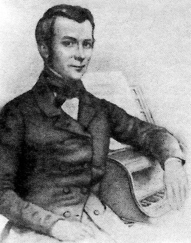 Der russische Komponist Alexander Lwowitsch Guriljow (1803-1858).